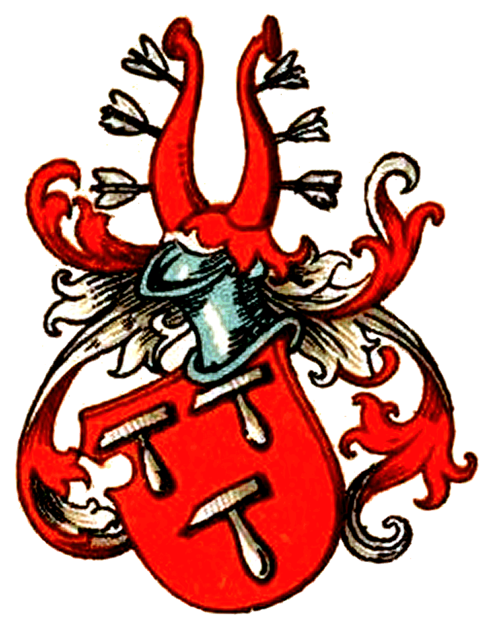 Wappen derer von Stein zum Altenstein